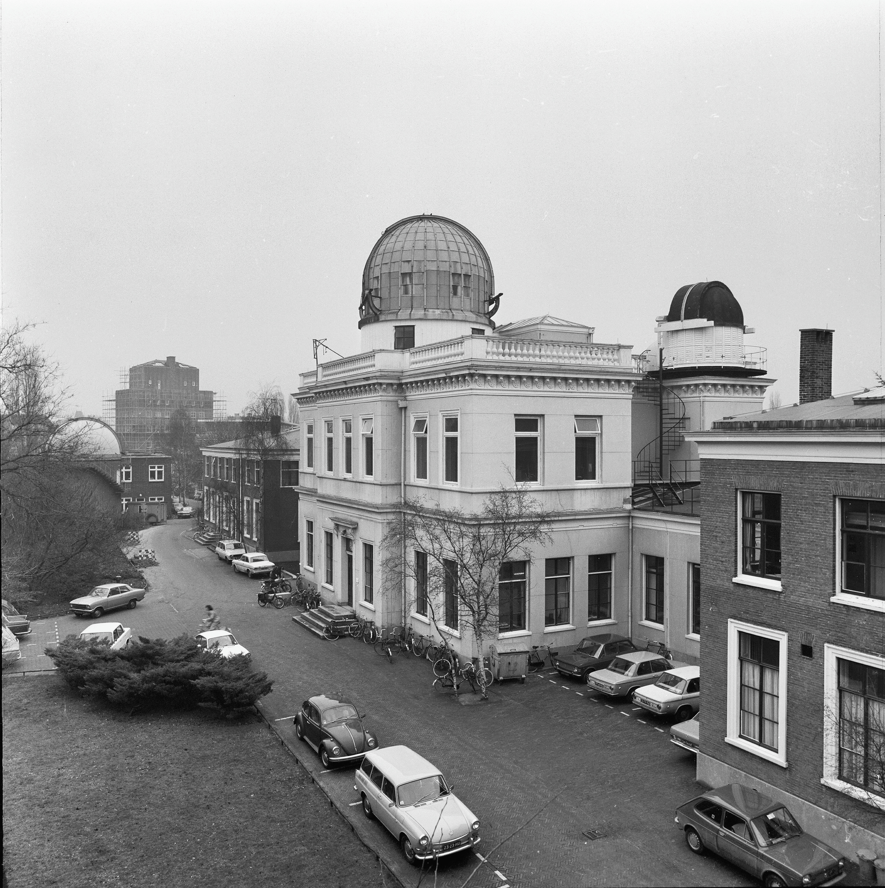 Sterrewacht: exterieur